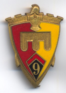 Insigne métallique du 9e Régiment de Génie ( Armée d'Armistice)